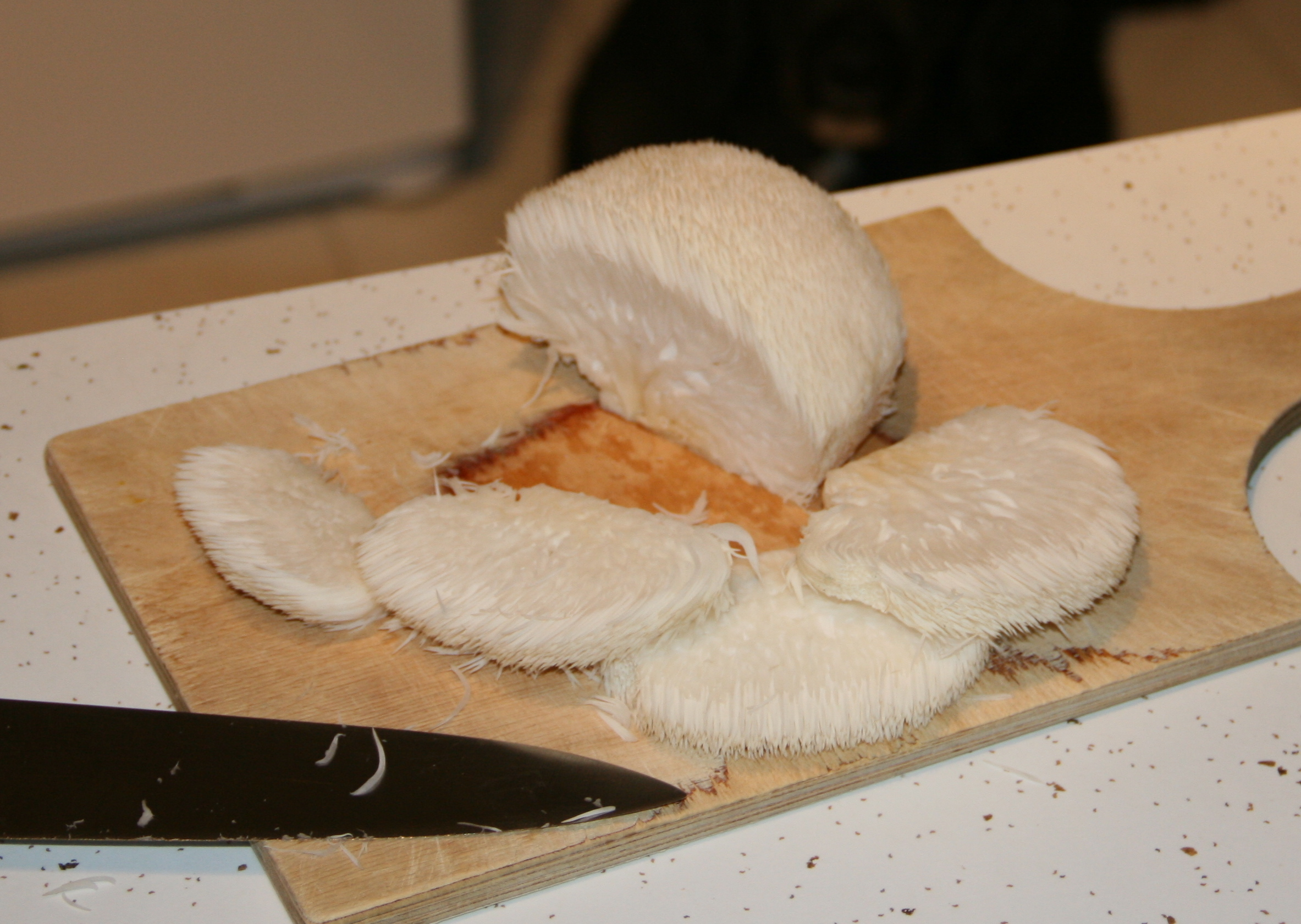 Hericium erinaceus (Bull.) Pers.